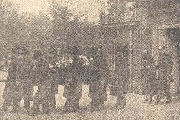 Begrafenis Johan de Meester